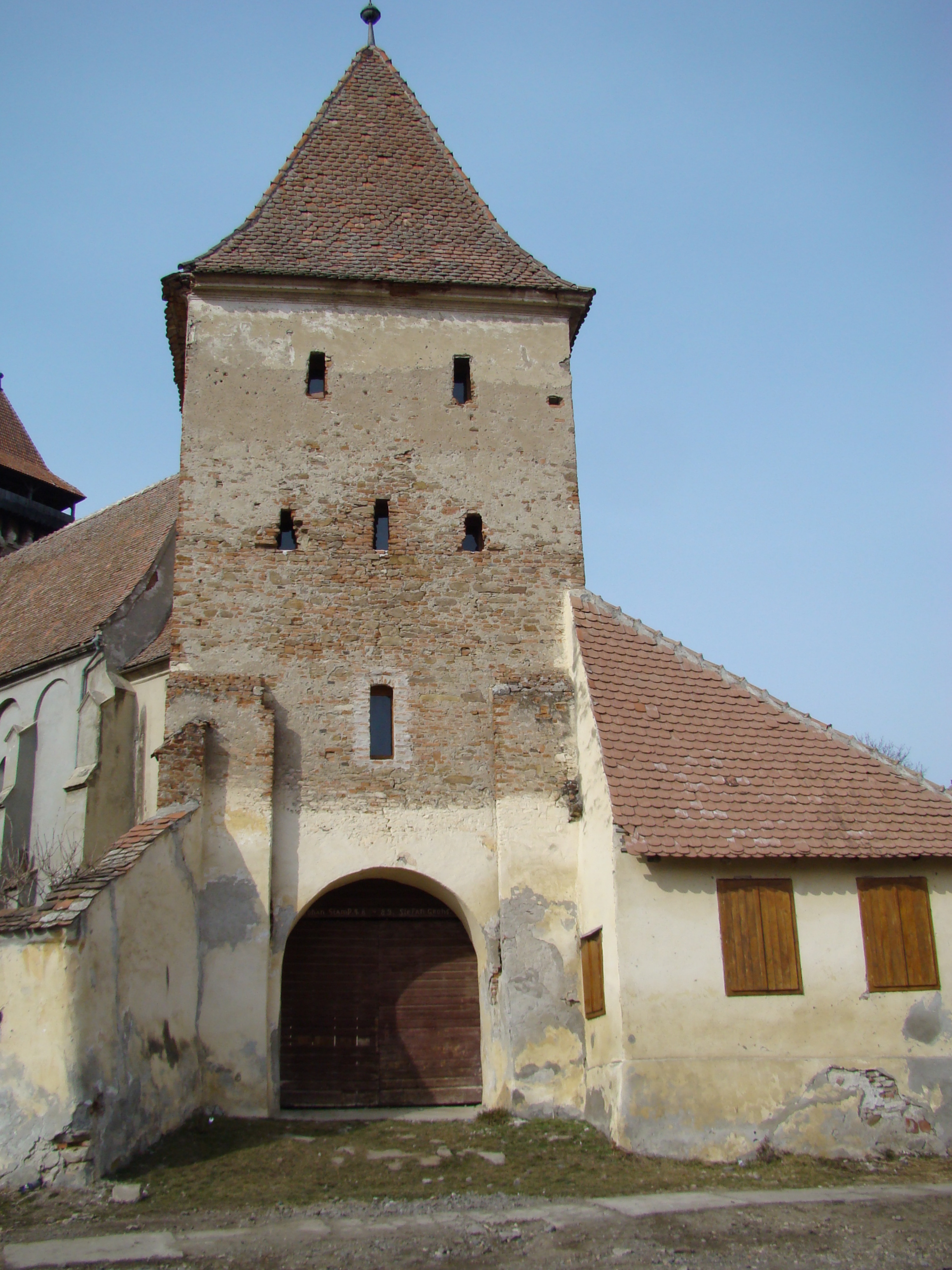 Incintă fortificată, sat BĂGACIU, județul Mureș 02